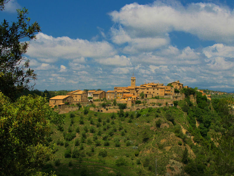 Sta. María d´Oló